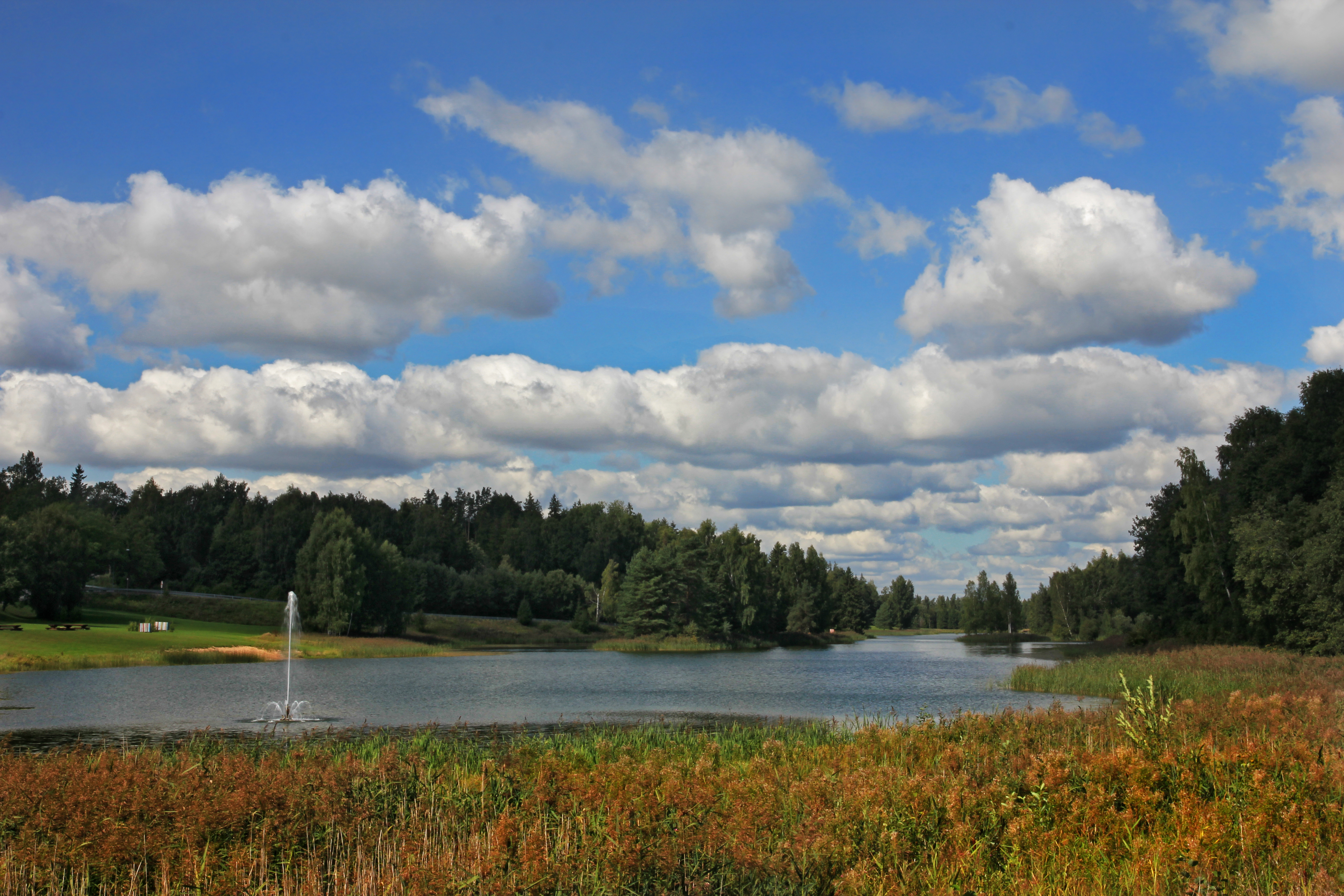 Karksi ürgorg